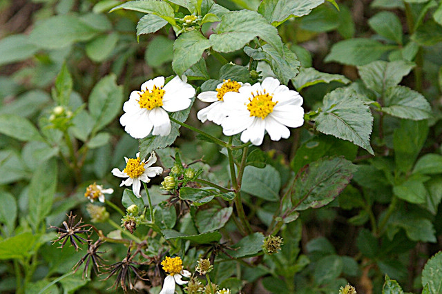 アワユキセンダングサ（沖縄県那覇市） Bidens pilosa var. bisetosa (Naha, Okinawa, JAPAN)